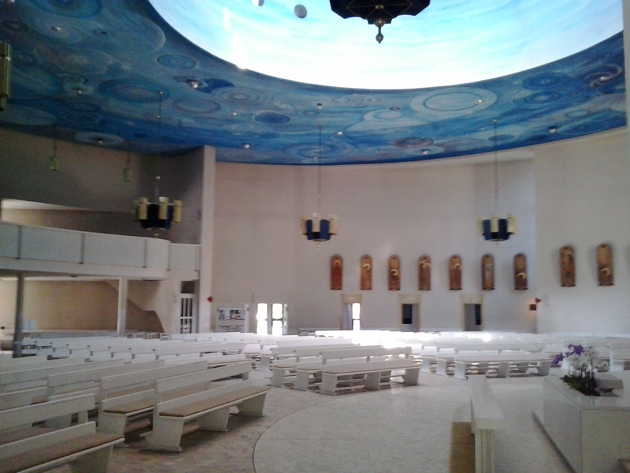 Kościół Św. Rodziny - Poznań, os. Kopernika.